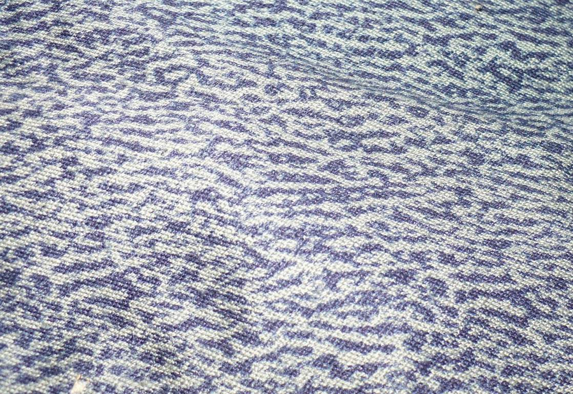 Tkanina z nadrukiem mora Milicji Obywatelskiej - niebieskim